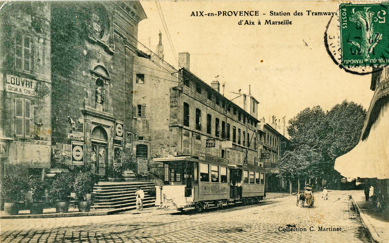 Carte postale ancienne éditée par Martinet : AIX-EN-PROVENCE - Station des Tramways d'Aix à Marseille